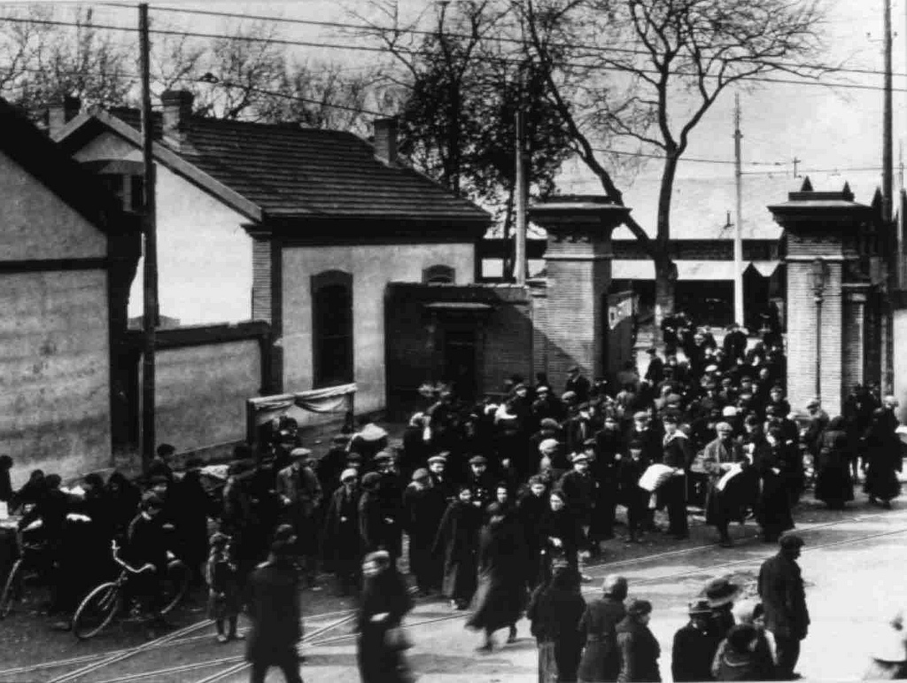 Toulouse (Haute-Garonne, France) : Sortie des employés de la Cartoucherie.